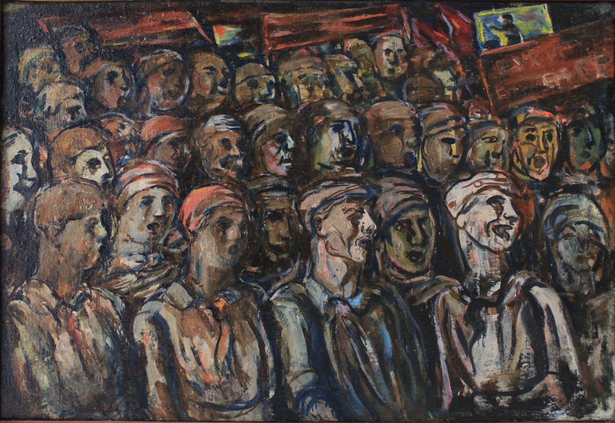 Картина Алексей Моргунова «Демонстрация». 1928. Холст, масло 61 х 89,5. Собрание Таганрогского художественного музея.